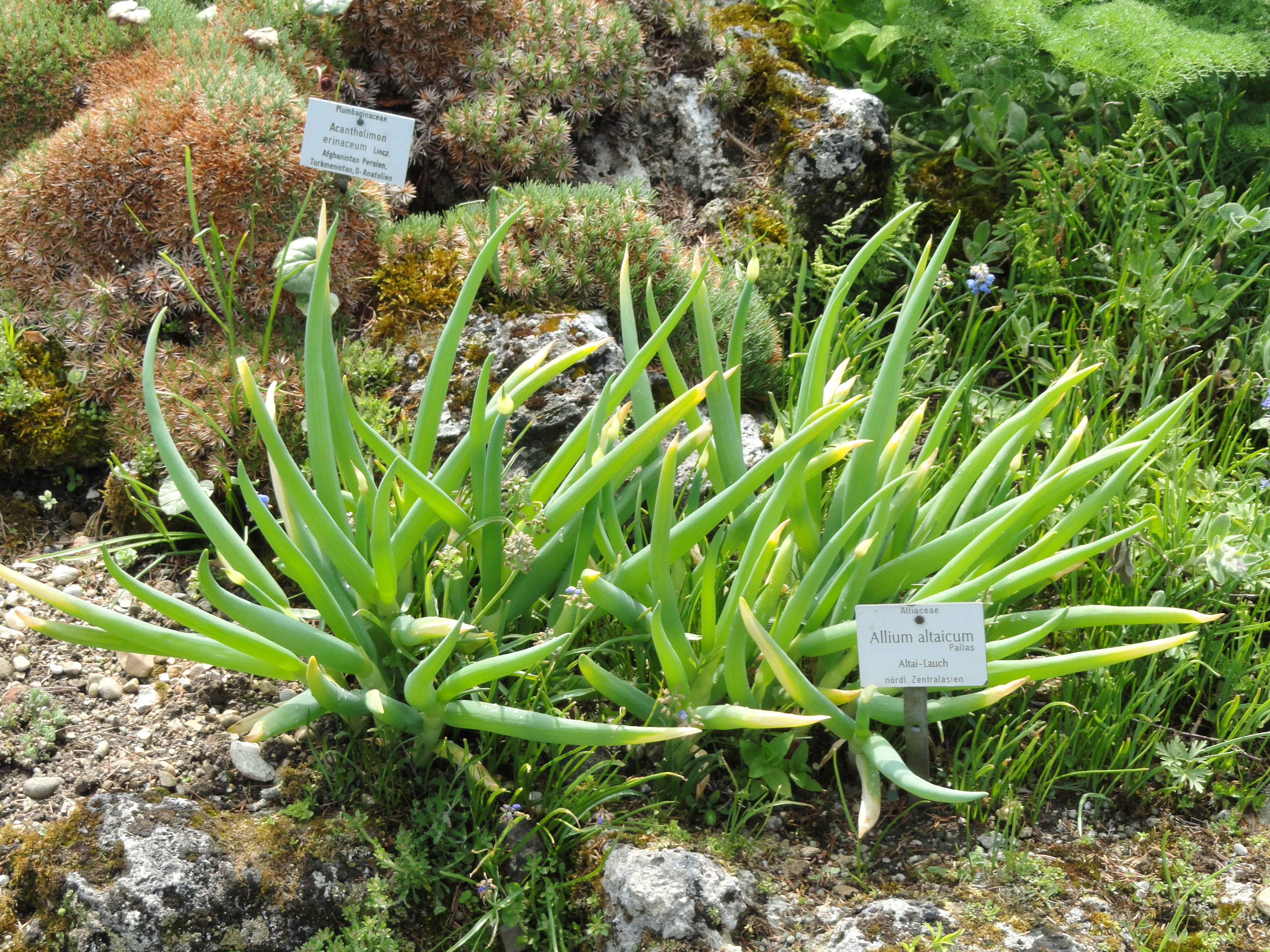 Allium altaicum specimen in the Botanischer Garten München-Nymphenburg, Munich, Germany.